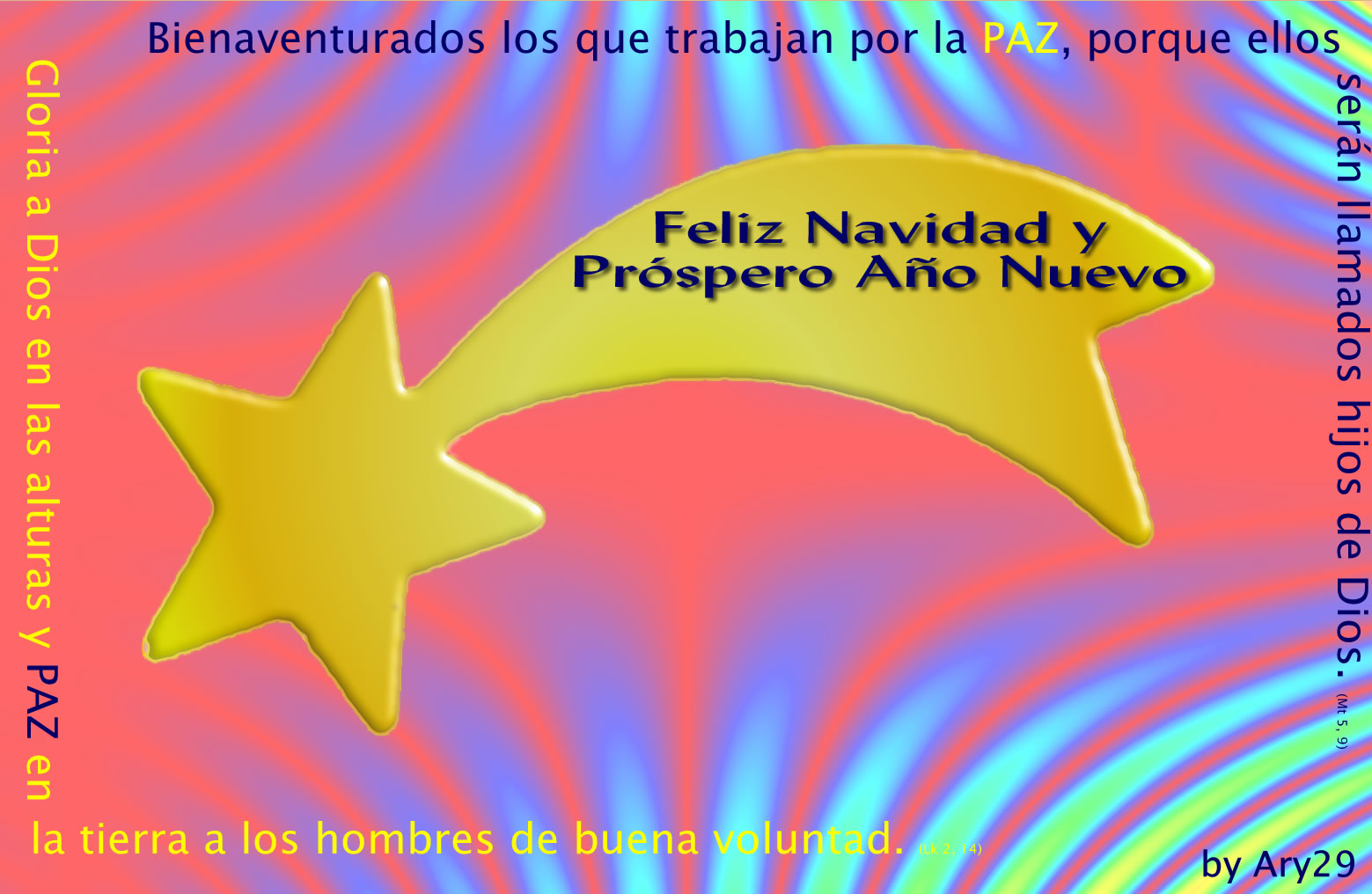 Diseño de Felices Pascuas sobre el tema de la paz